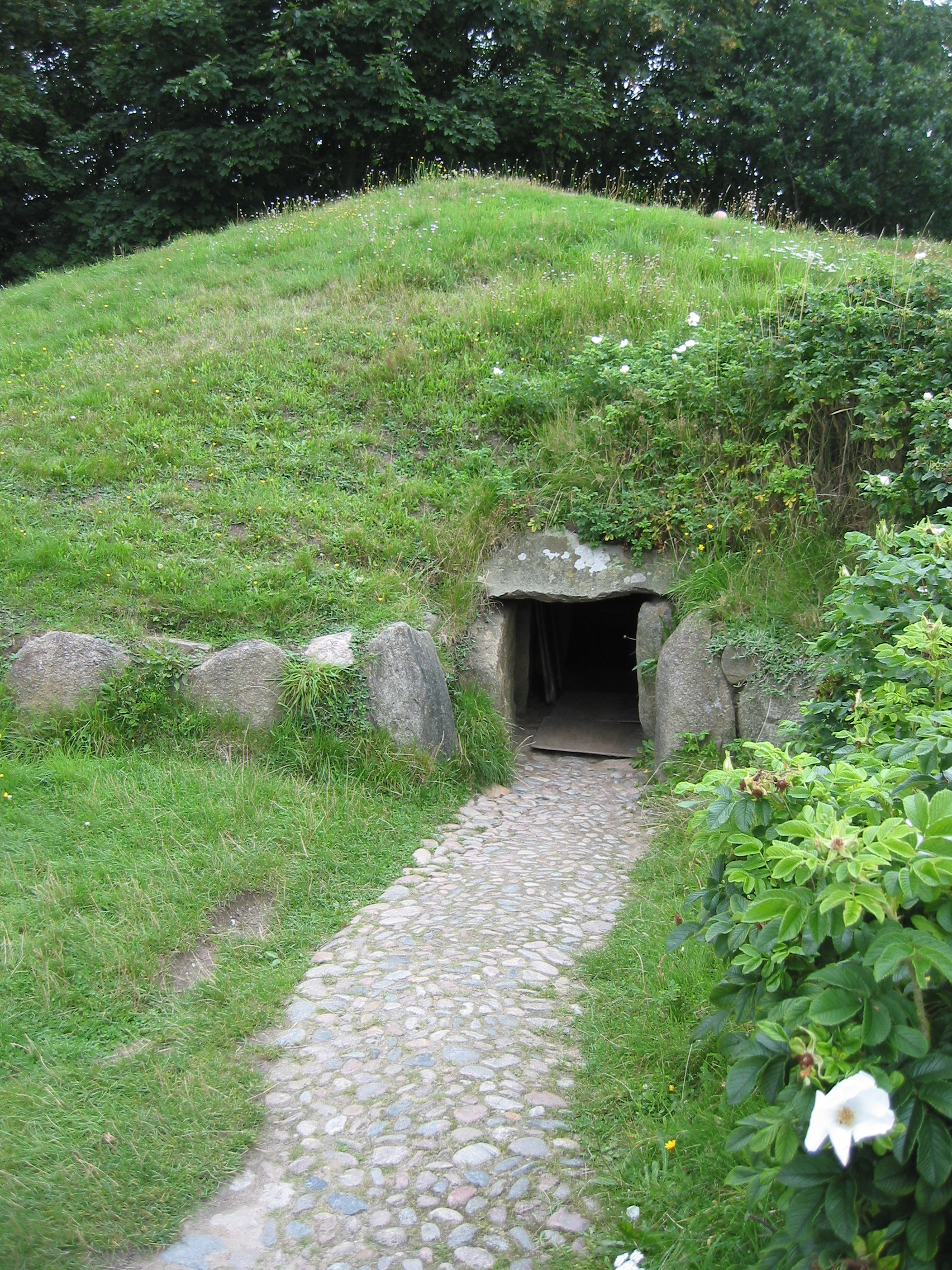 Wenningstedt Denghoog (lower entry)